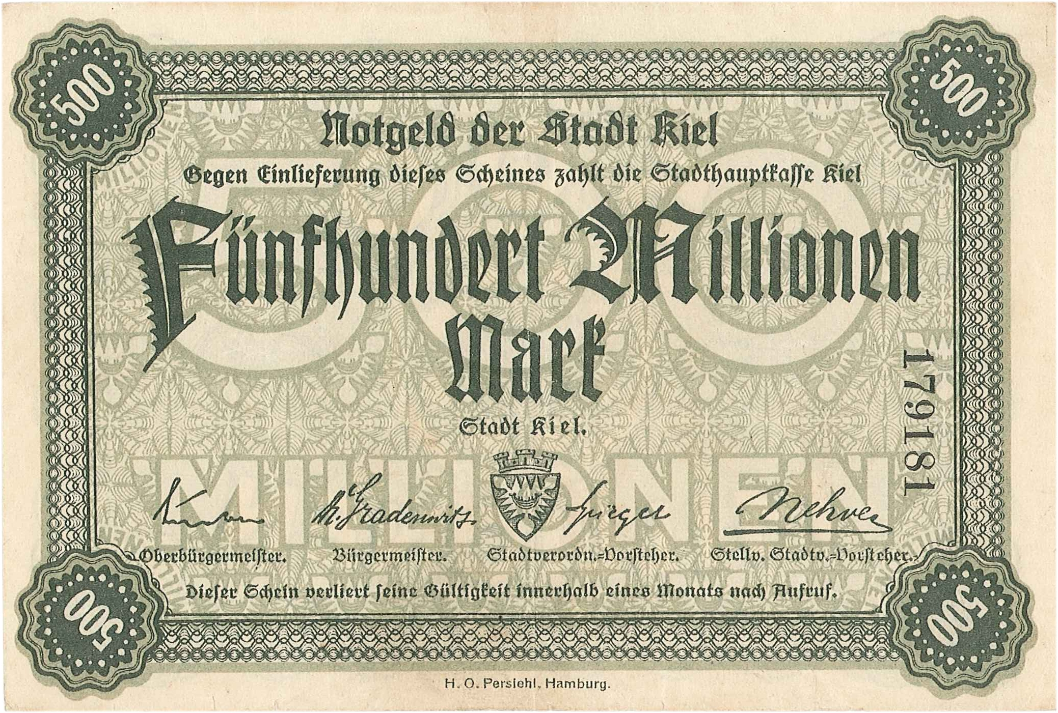 Notgeld Stadt Kiel 500 Mio Mark